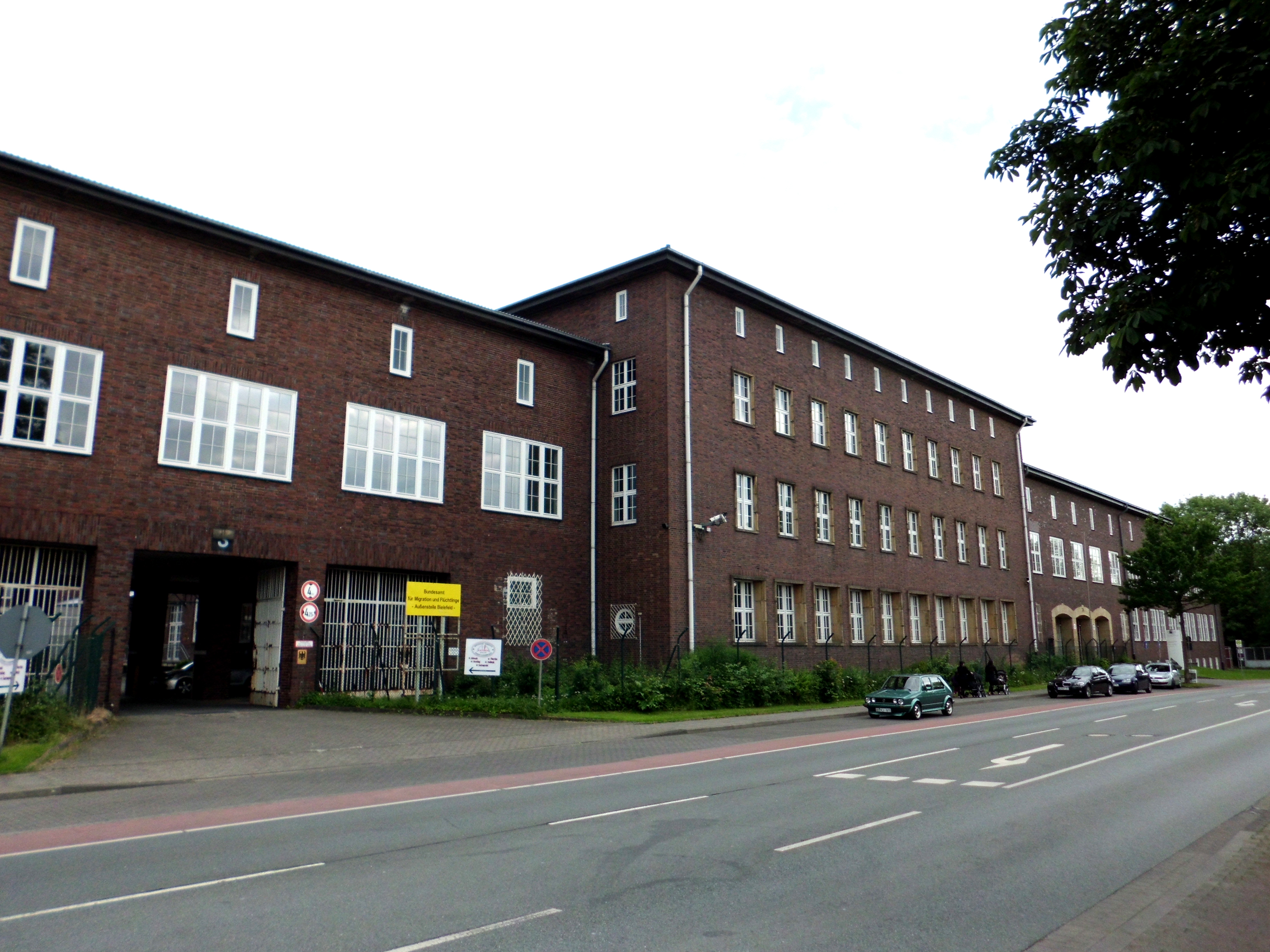 Bielefeld, Denkmalnummer 440, Richmond-Kaserne, gebaut 1938/39